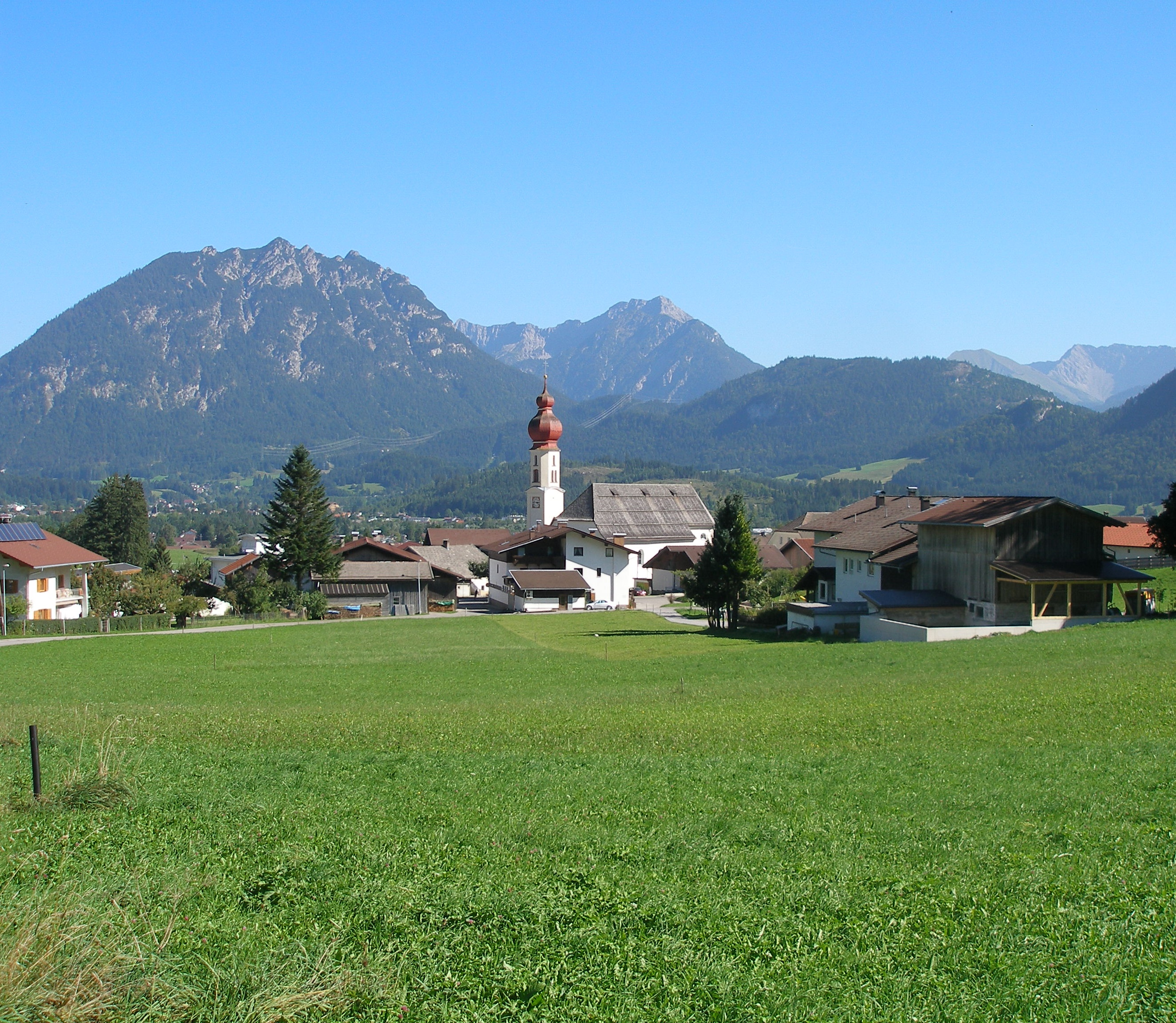 Pfarrkirche St. Martin Wängle